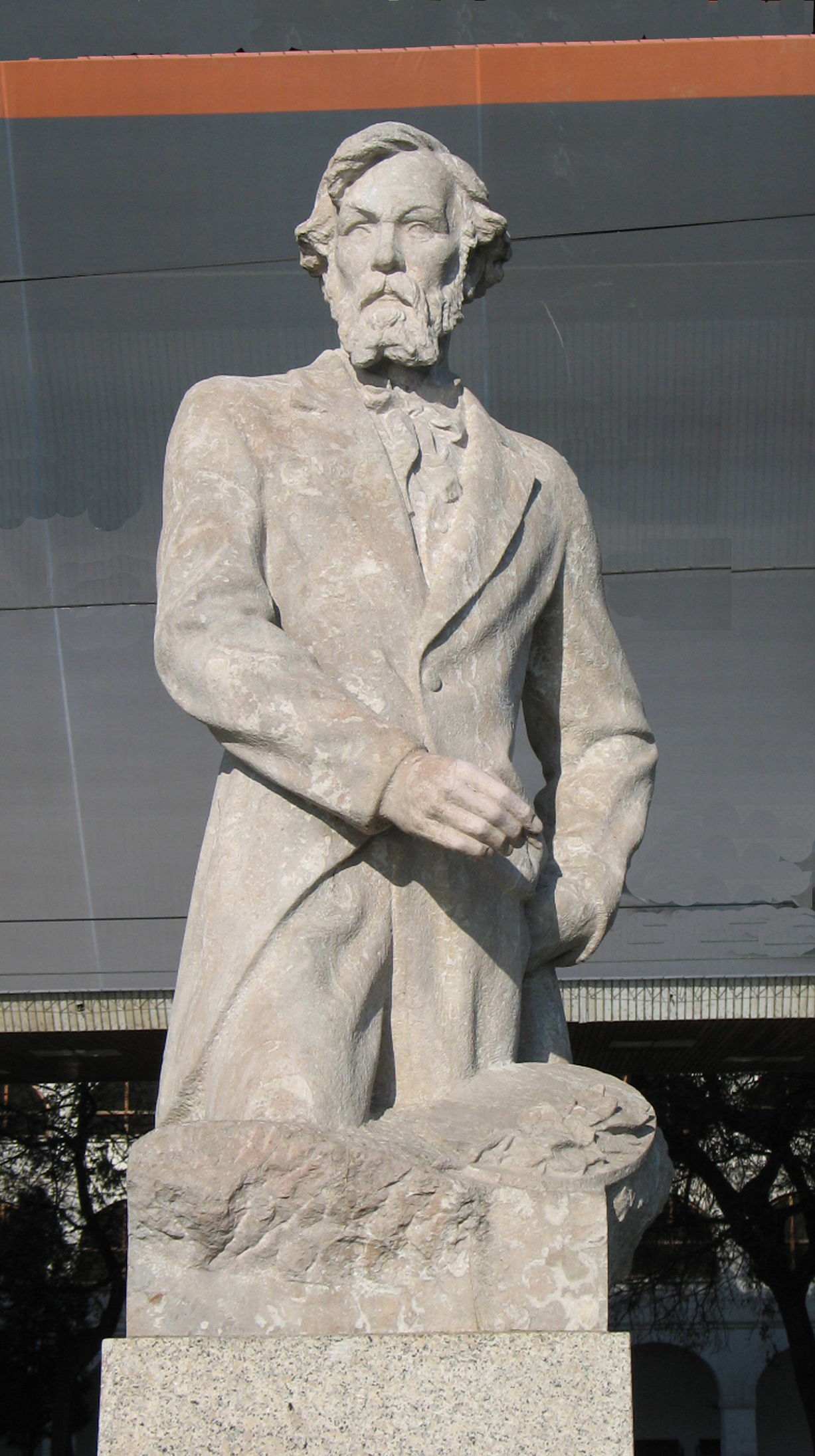 Peter Michal Bohúň, maliar. Jeden zo zakladateľov slovenského národného maliarstva.